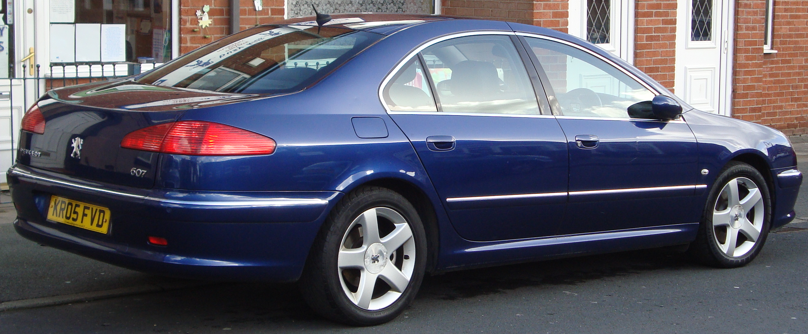 2005 Peugeot 607 SE HDI